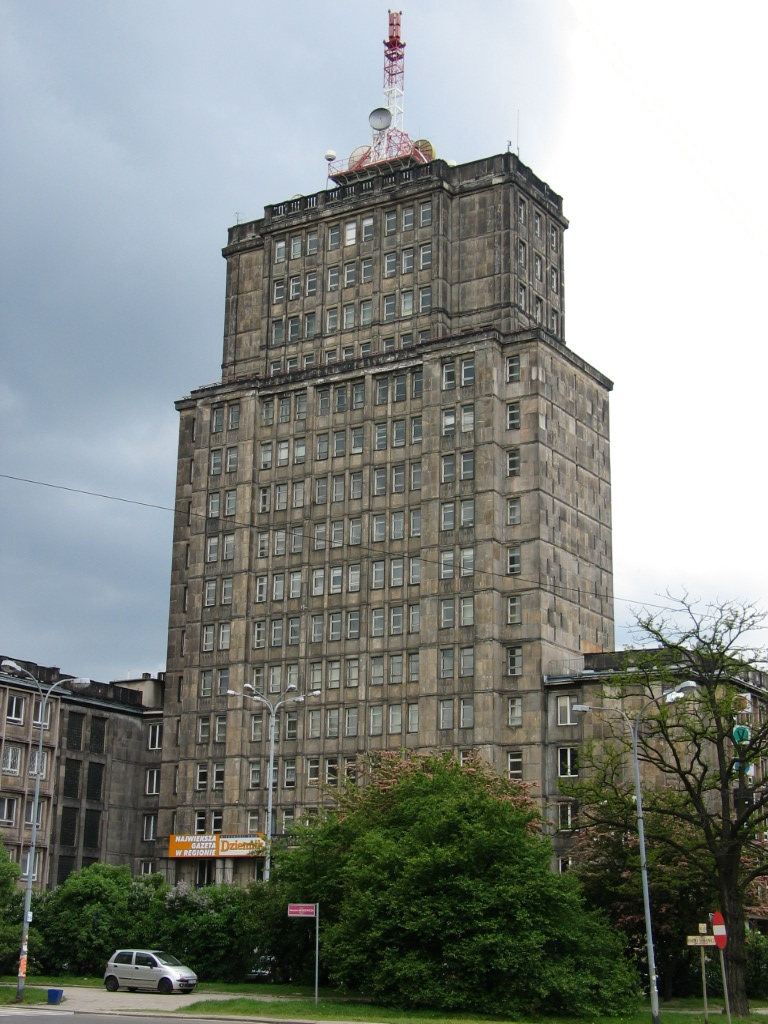 Budynek TVP w Łodzi